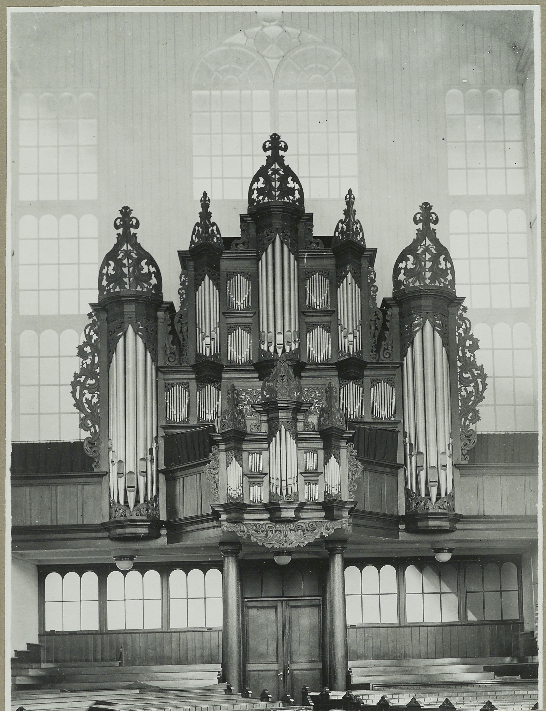 Nederlands Hervormde Kerk: Interieur orgel (opmerking: Toelichting op achterzijde)